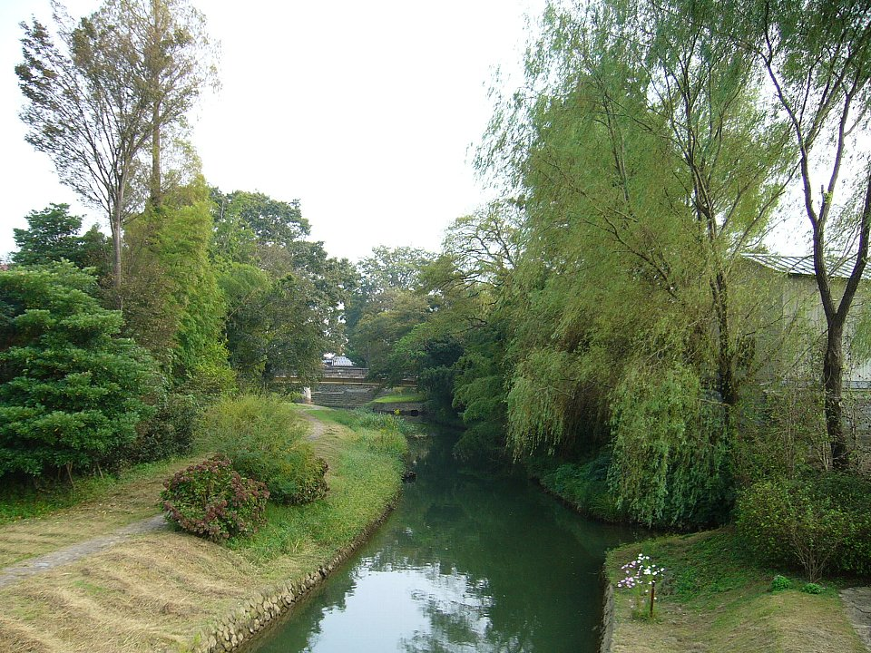 旧大聖寺川 中央大橋から上流方を望む